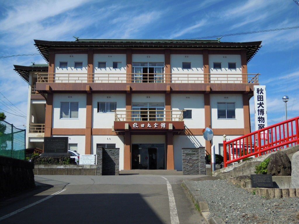 秋田県大館市にある秋田犬会館の前景